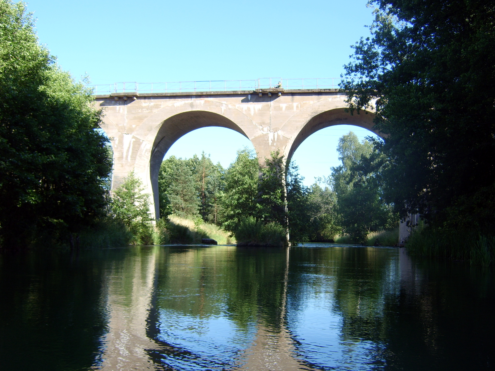 Pont sur la Brda (Pologne) / Bridge over the Brda (Poland) / Most kolejowy na Brdzie w miejscowości Rytel